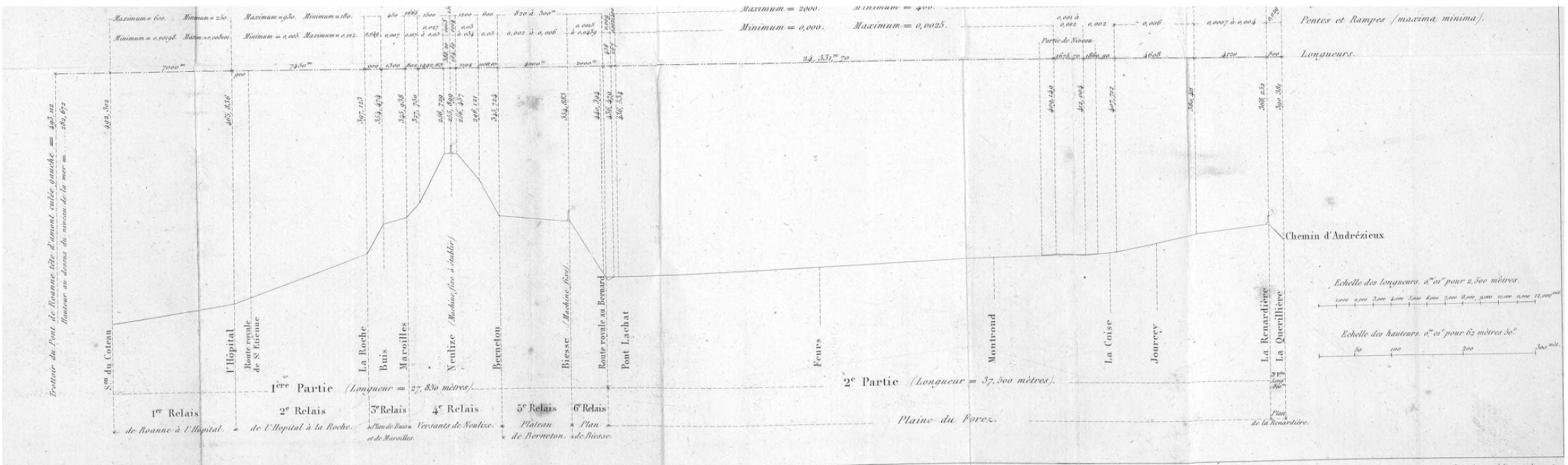 Titre : [Annales des ponts et chaussées. Mémoires et documents relatifs à l'art des constructions et au service de l'ingénieur] 1844 (2ème série, volume 1,tome 7). Article d'Auguste Bousson : "Chemin de fer de la Loire, d'Andrézieux à Roanne - Mémoire sur le choix des moyens de traction à employer et sur les modifications à apporter à ceux qui sont actuellement en usage sur les différentes partie de la ligne" (page 318 à 352 + carte page 391) Éditeur : Carilian-Goeury (Paris) Date d'édition : 1831-1896 Type : texte,publication en série imprimée Langue : Français Format : application/pdf Identifiant : ark:/12148/cb34348188q/date Identifiant : ISSN 00034304 Source : Ecole nationale des ponts et chaussées Relation : Description : Etat de collection : SER1,VOL1 (1831)-SER7,T12 (1896) Provenance : bnf.fr